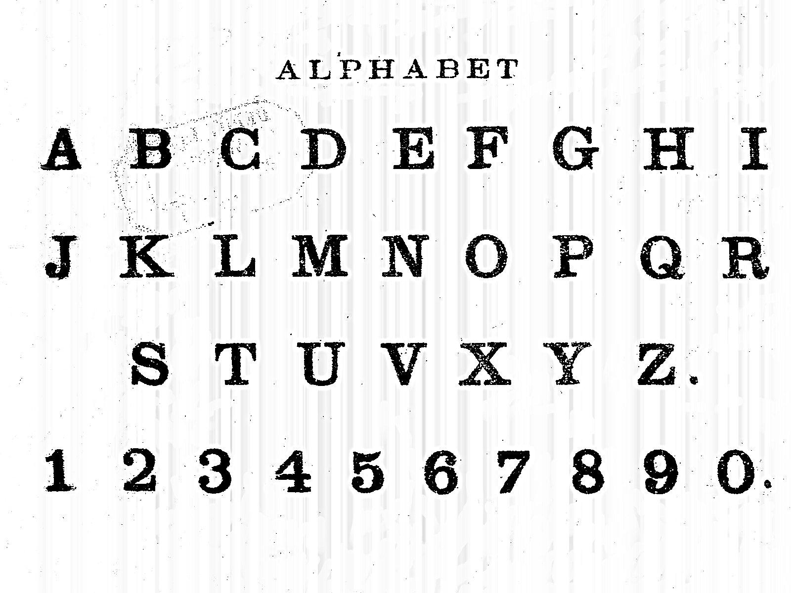 Images d'Épinal : Alphabet des enfants sages